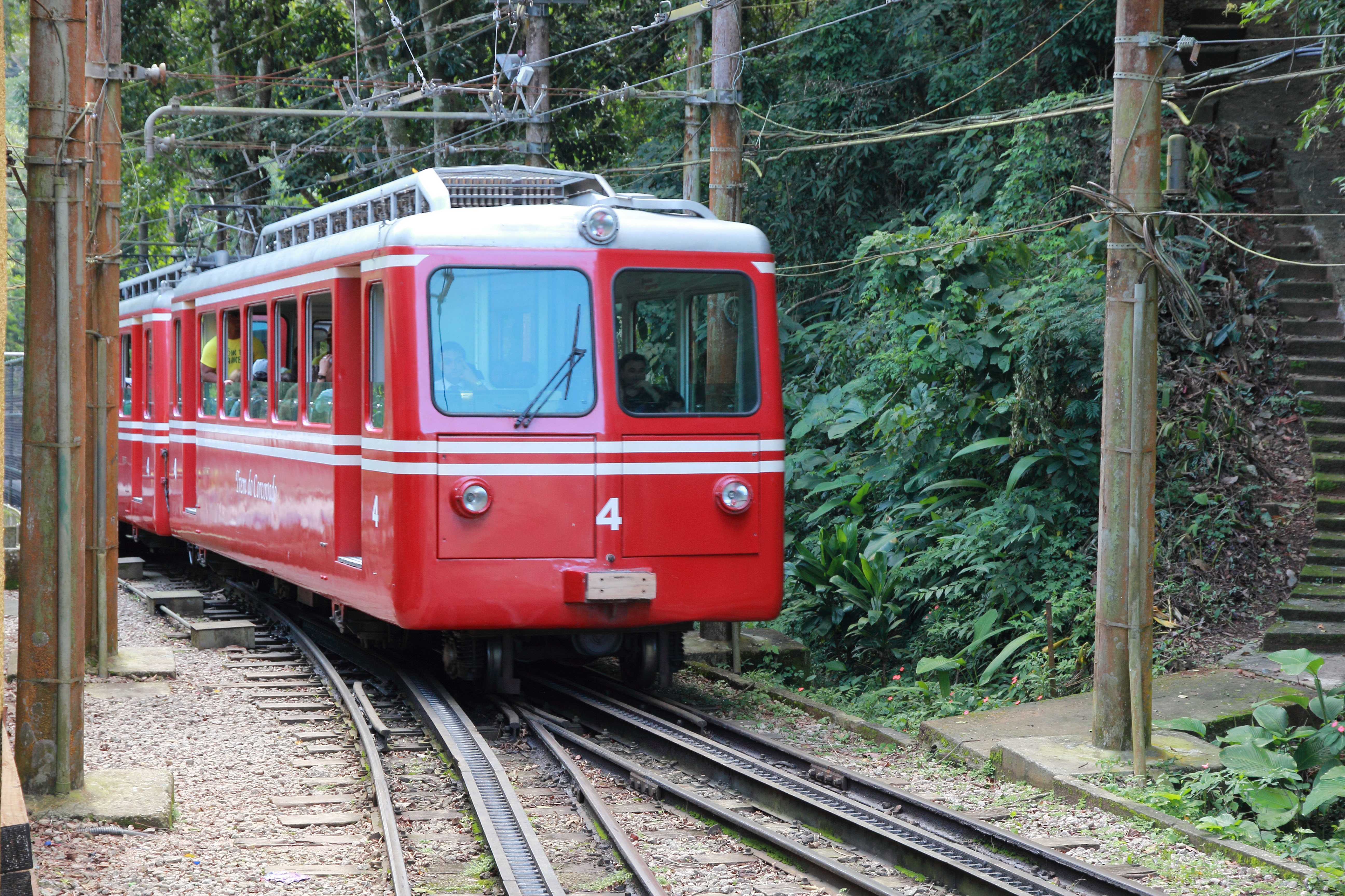 Trem do Corcovado na Estação Paineiras